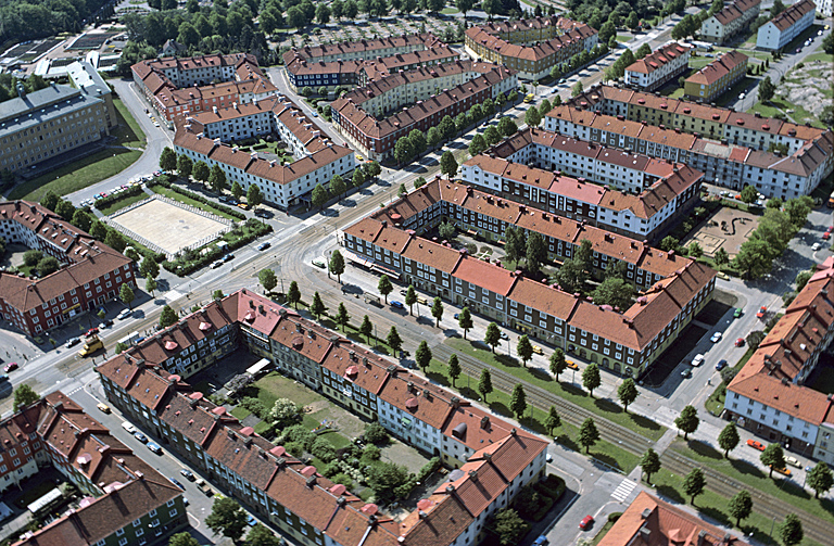 Flygbild över Älvsborgsplan. Älvsborgsdammen t.v. Motiv: Älvsborgsplan Nyckelord: Flygbilder, Riksintressen Kategori: StadsmiljöFlygbild över Älvsborgsplan. Älvsborgsdammen t.v.